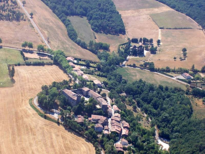 Vue aérienne de La Pomarède